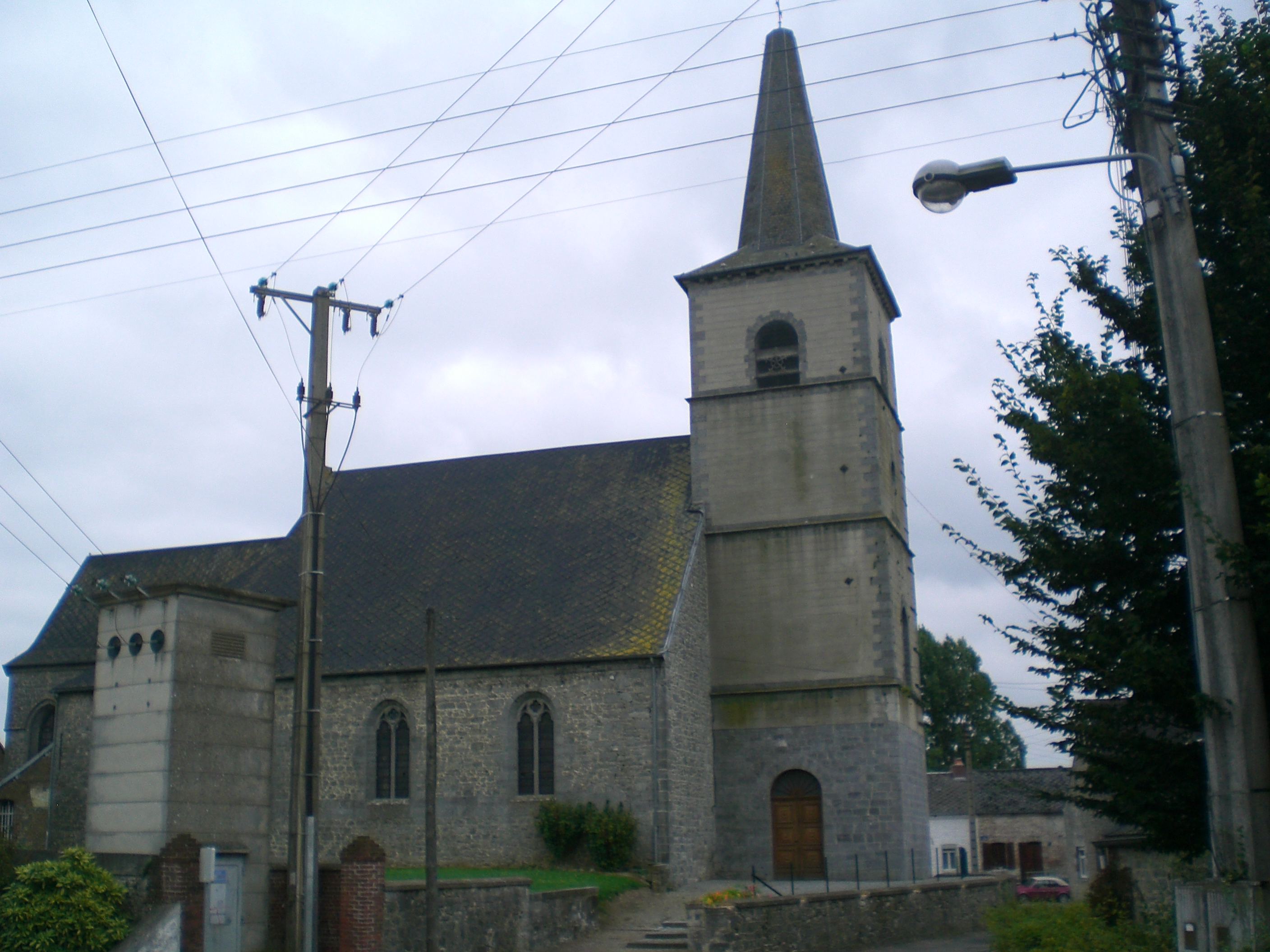 eglise de beaufort nord france